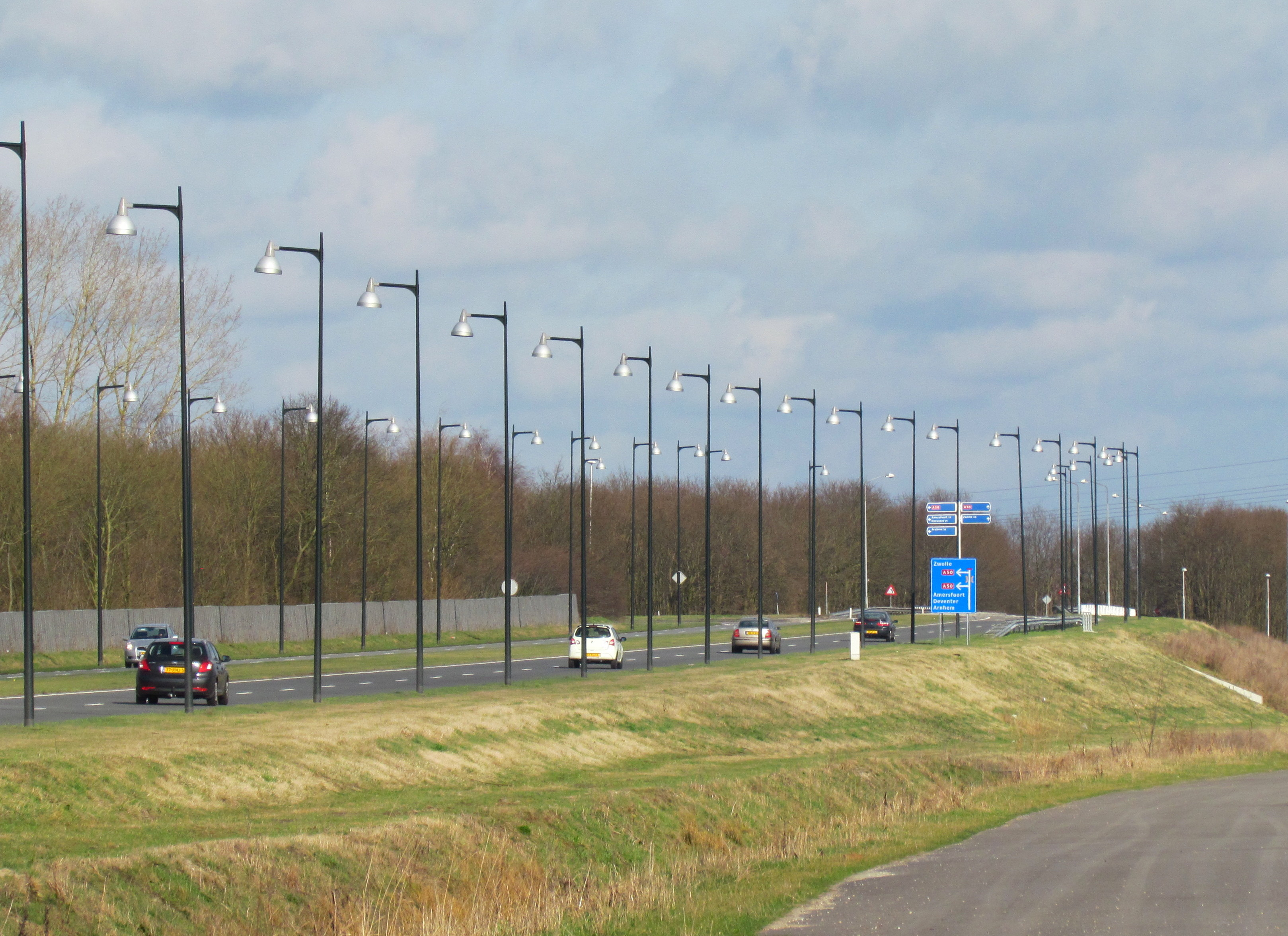 Oost Veluweweg (Apeldoorn-Noord), bij de toerit naar de snelweg A50